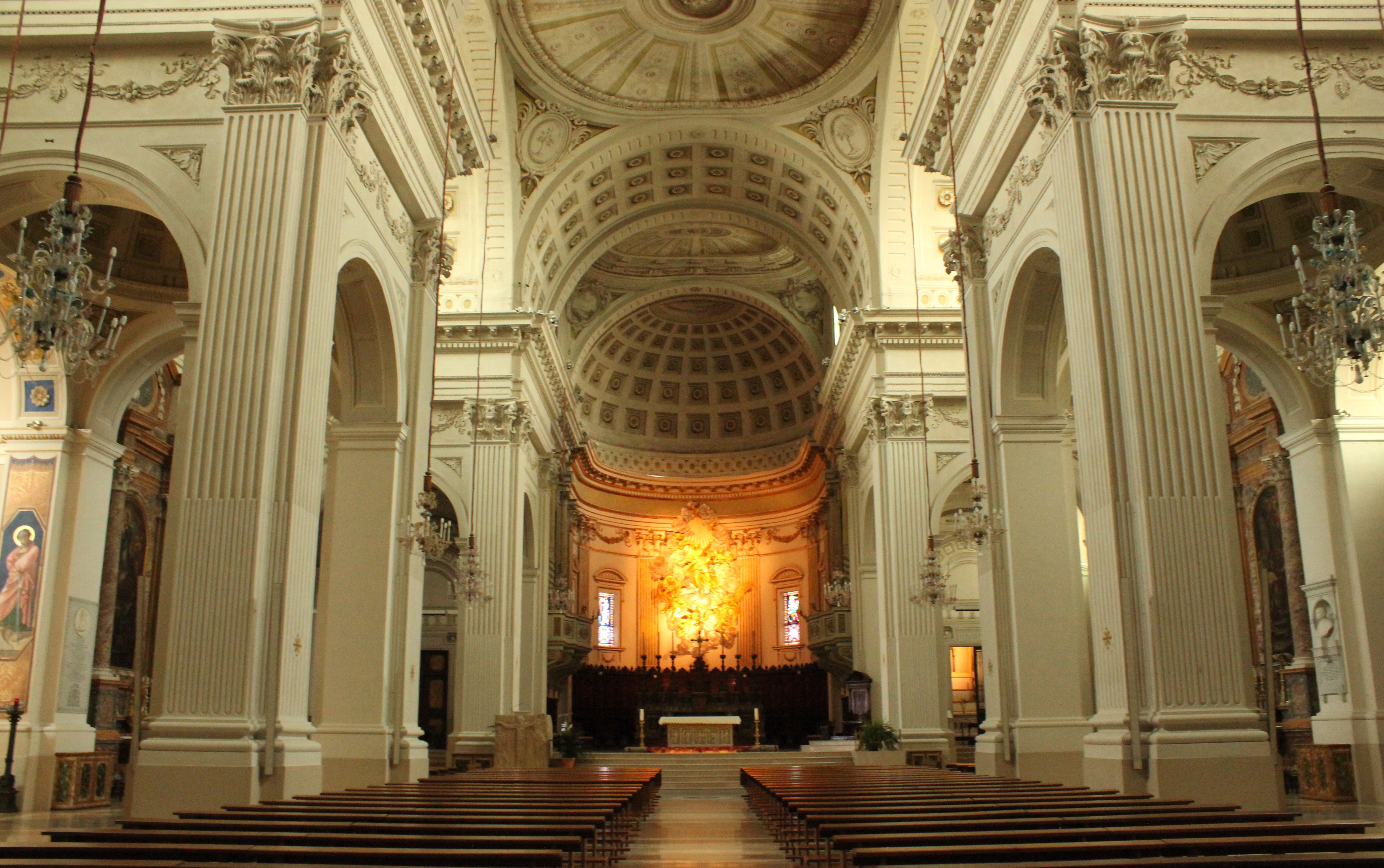 Parde dell' interno del duomo di Fermo.